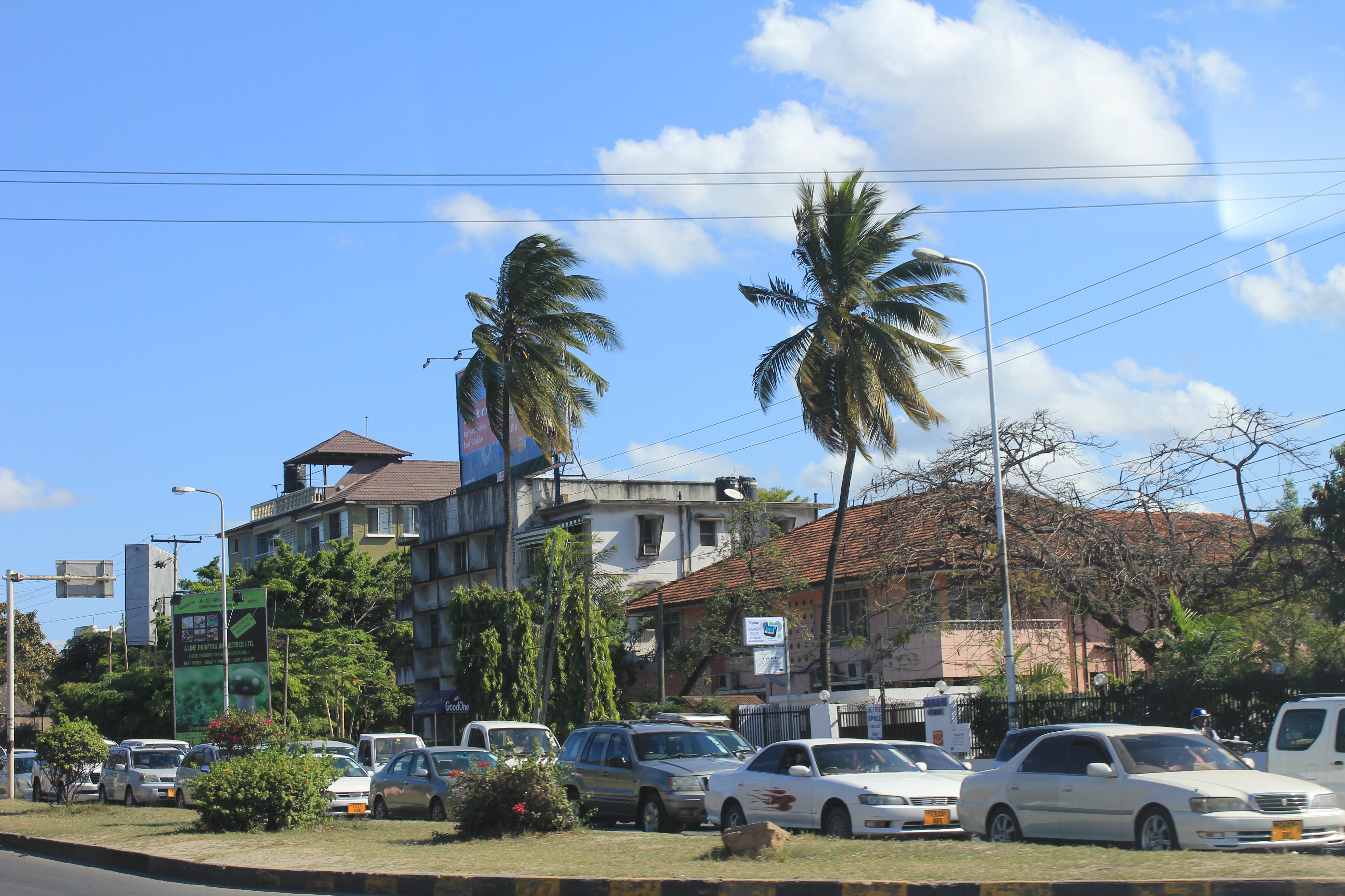 Upanga East, Dar es Salaam, Tanzania